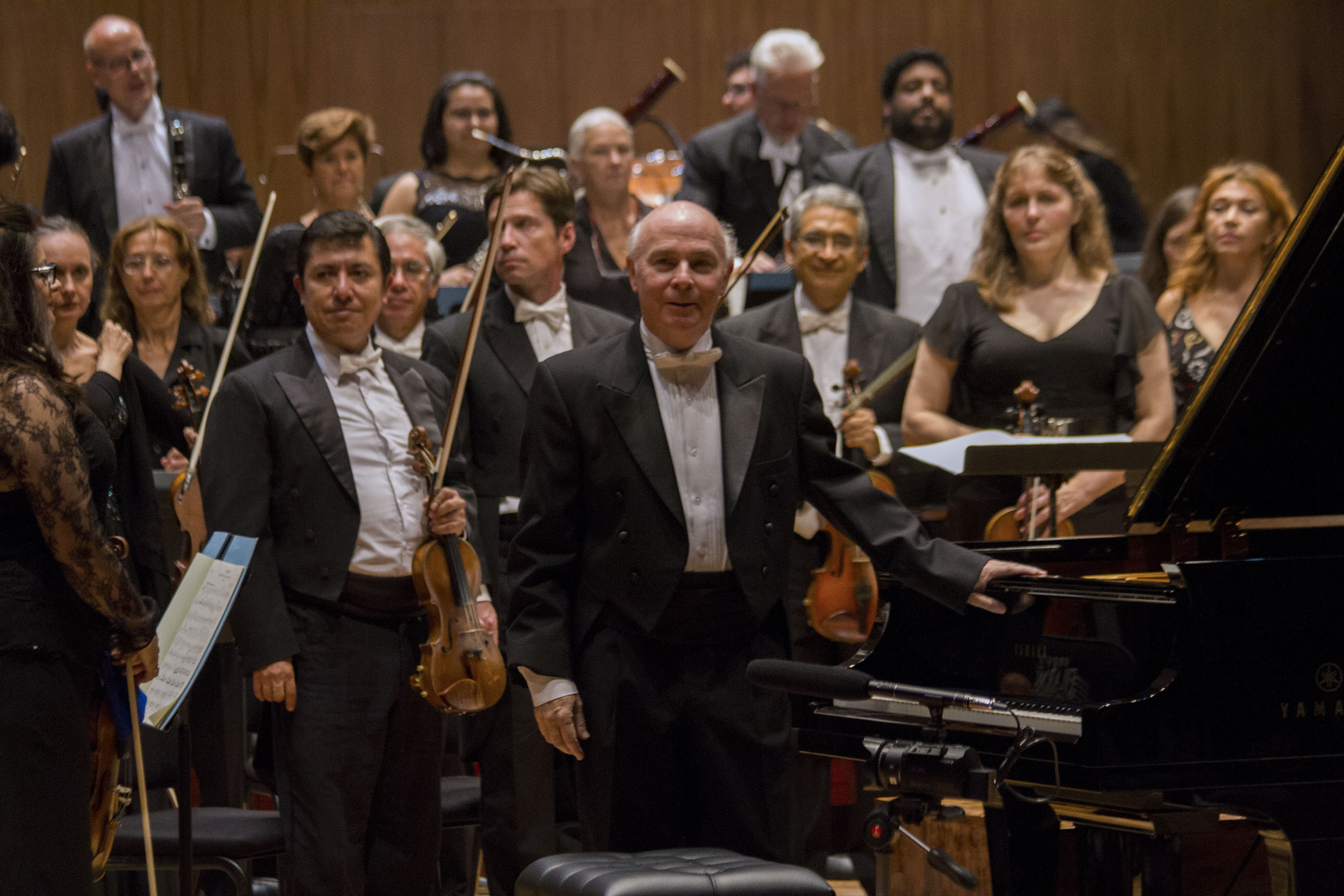 Sábado 8 de septiembre de 2018. En la Sala Silvestre Revueltas del Centro Cultural Ollin Yoliztli, la Orquesta Filarmónica de la Ciudad de México reinició el último segmento de su Temporada 2018 con su concierto habitual, bajo la dirección del titular Scott Yoo y con la participación como solista del pianista Jorge Federico Osorio y con interpretaciones de obras de Johannes Brahms (Concierto para piano No. 2) y Ottorino Respighi (Los pinos de Roma). Fotografía: Maritza Ríos / Secretaría de Cultura CDMX.